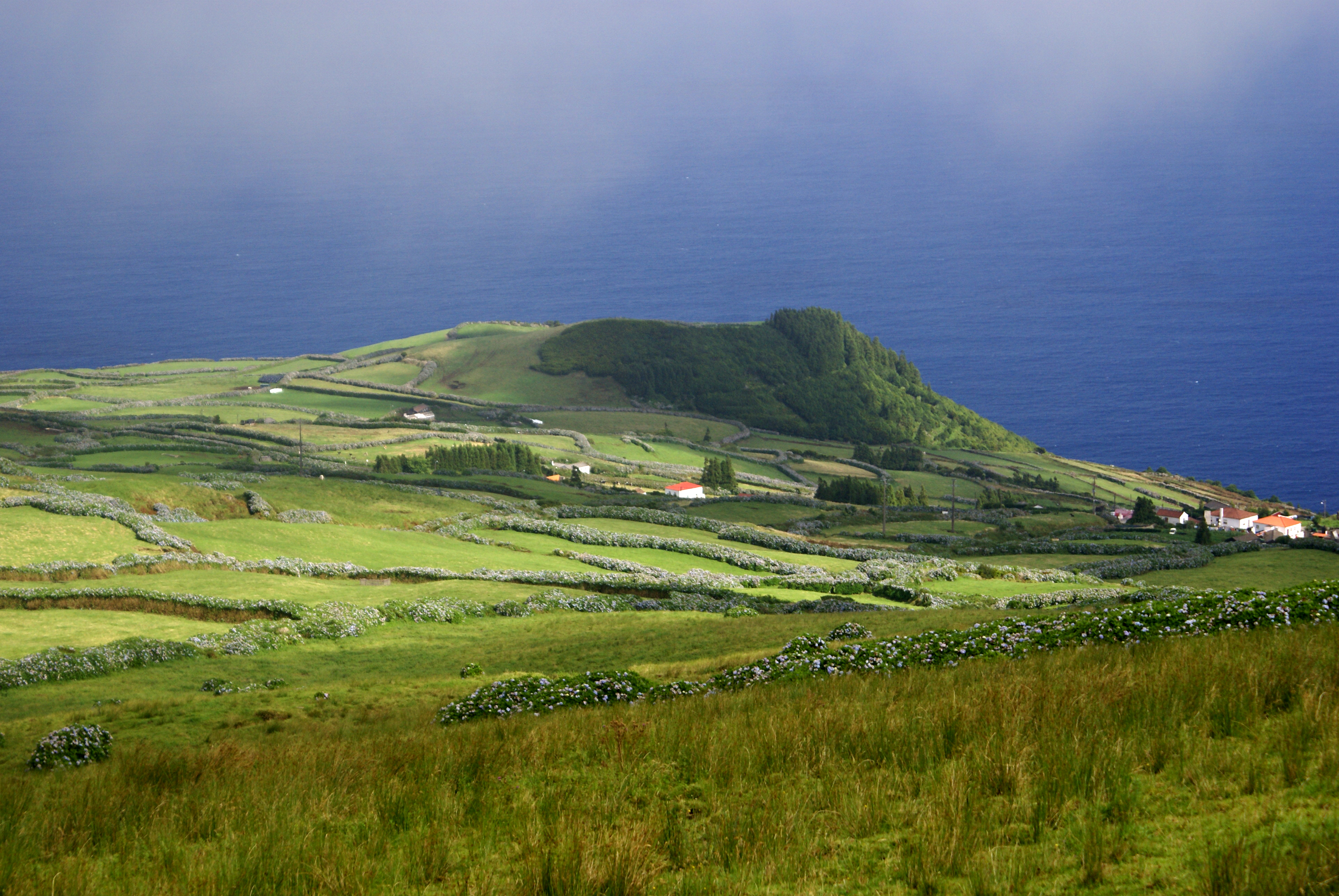 Pico do Loiçano, Toledo, Velas, ilha de São Jorge, Açores